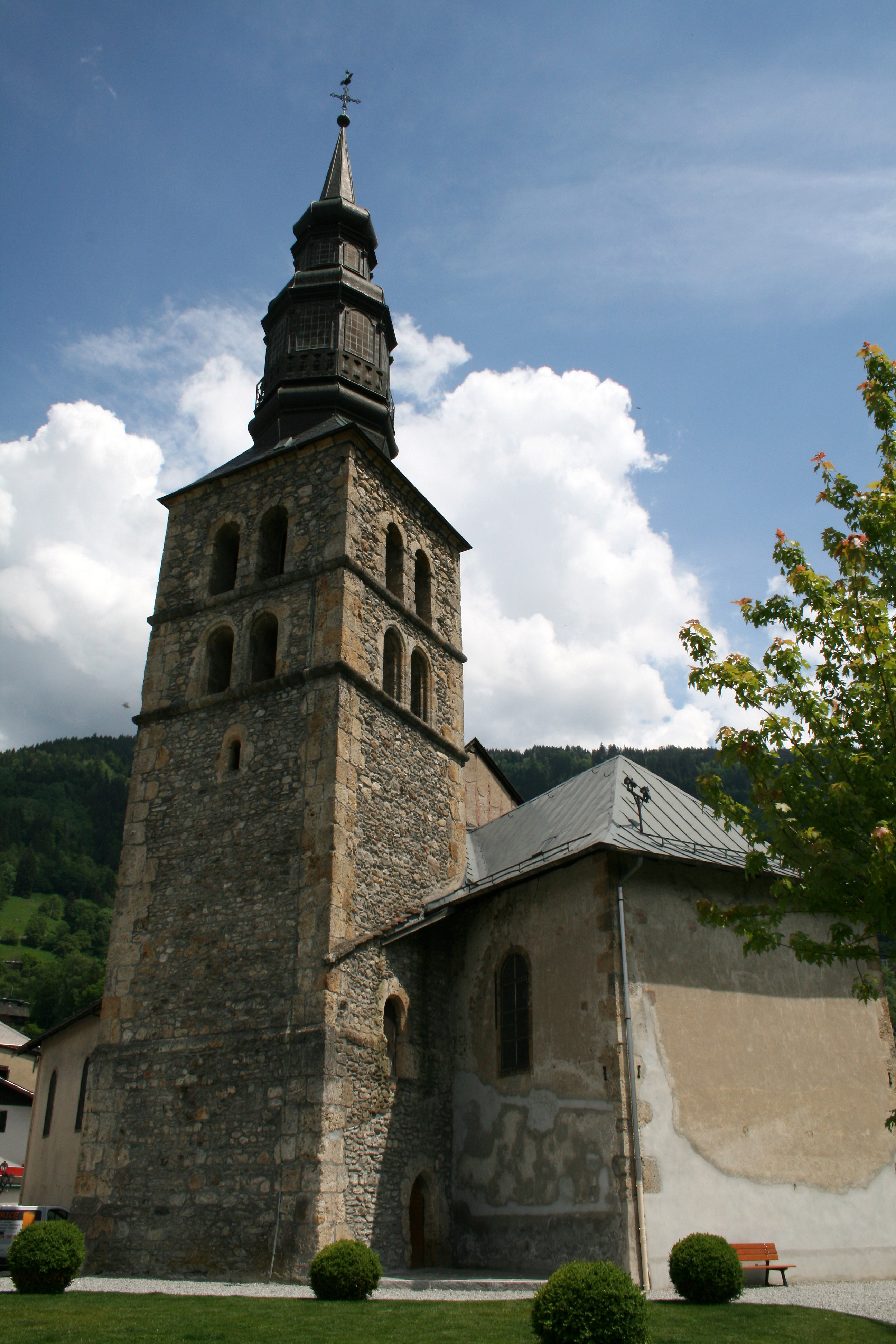 Saint-Gervais-les-Bains (Haute-Savoie - France), l'église Saint-Gervais et Protais (construite en 1698 à l'exception de sa tour du XIIème siècle et de son clocher reconstruit en 1819).